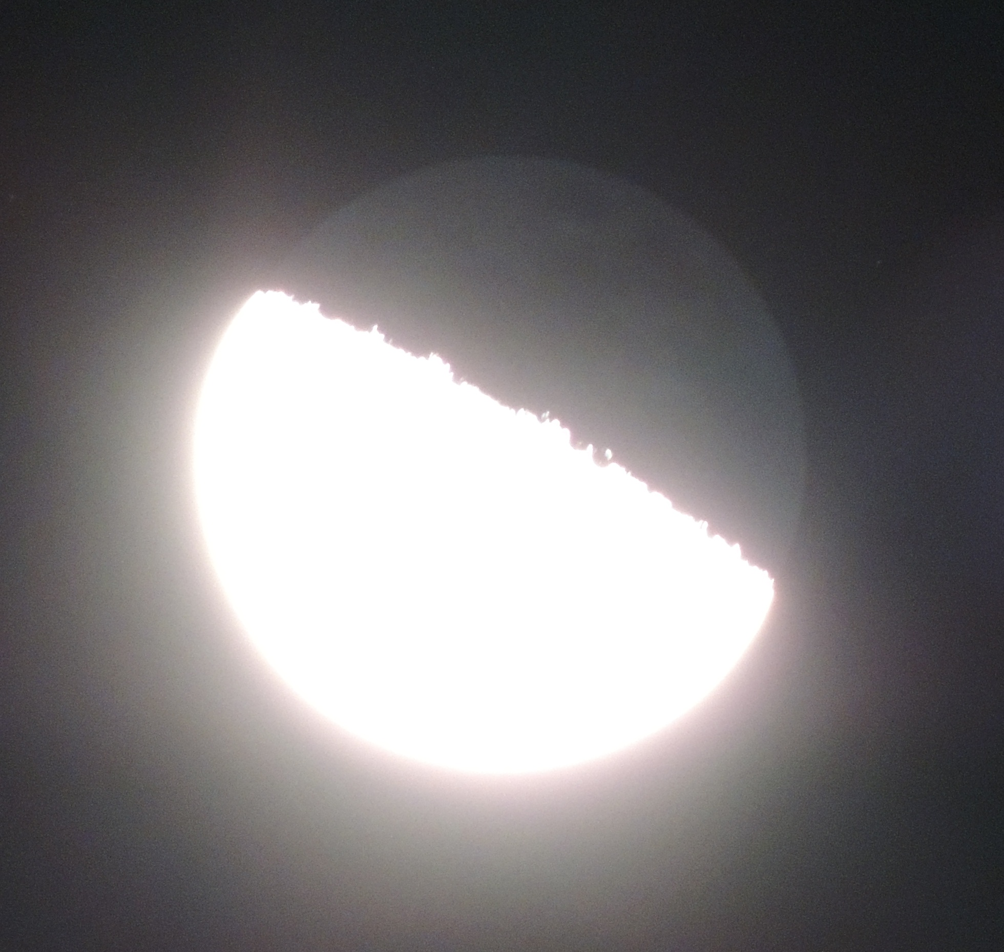 下弦前の、半月より輝面が多い月の地球照